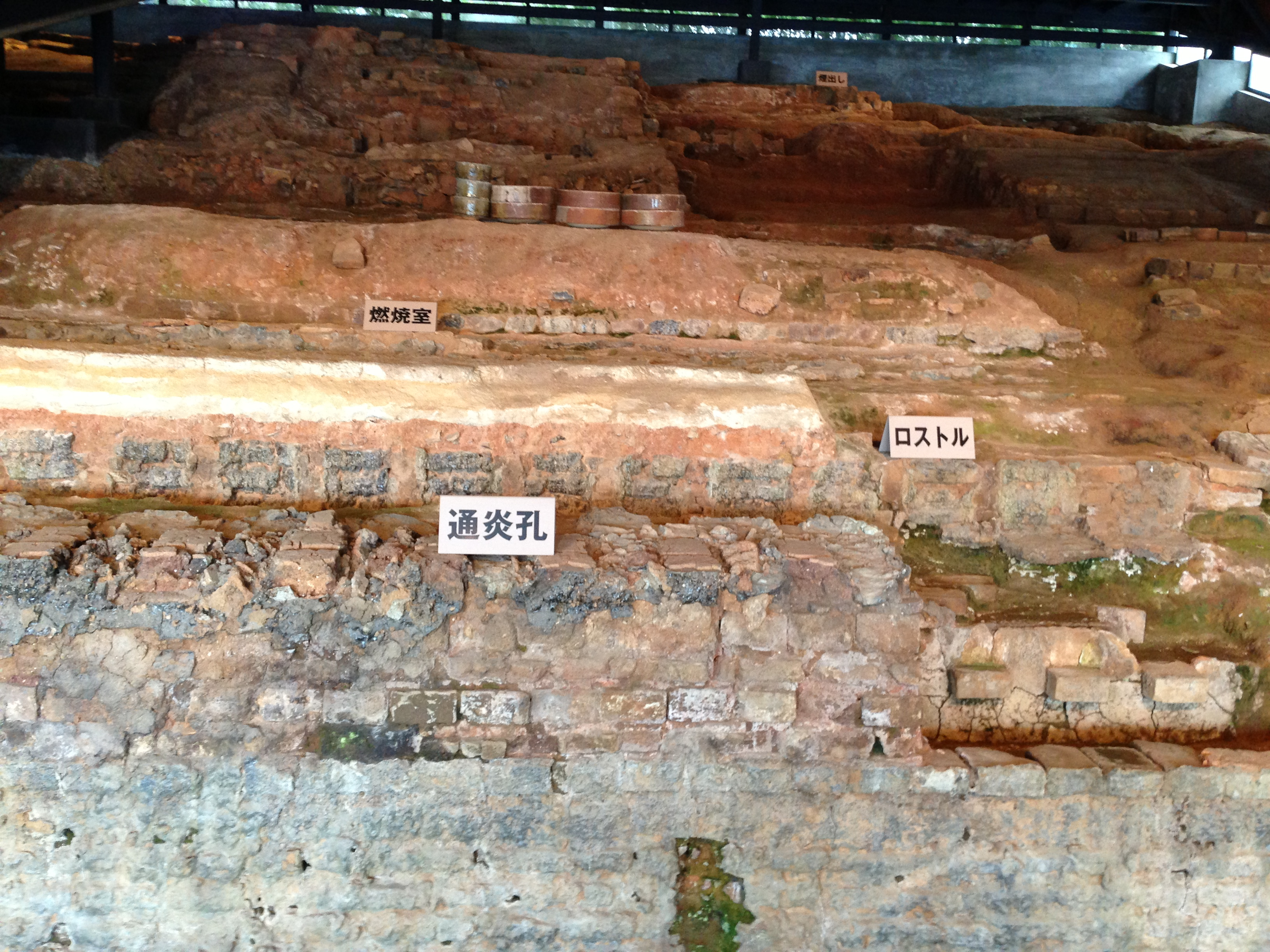 iPhone 5. 九谷焼窯跡展示館